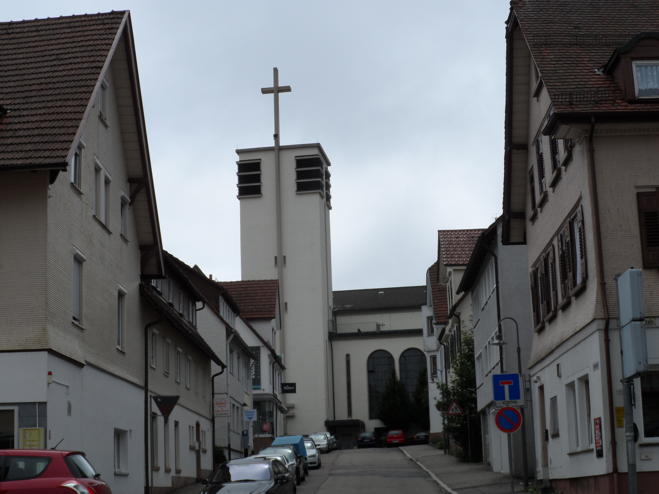 kath. Taborkirche Freudenstadt